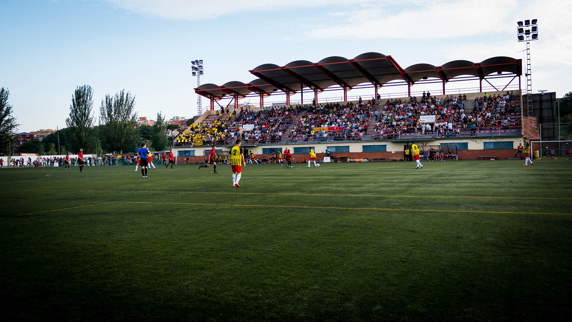 Estadio Municipal de Ripollet